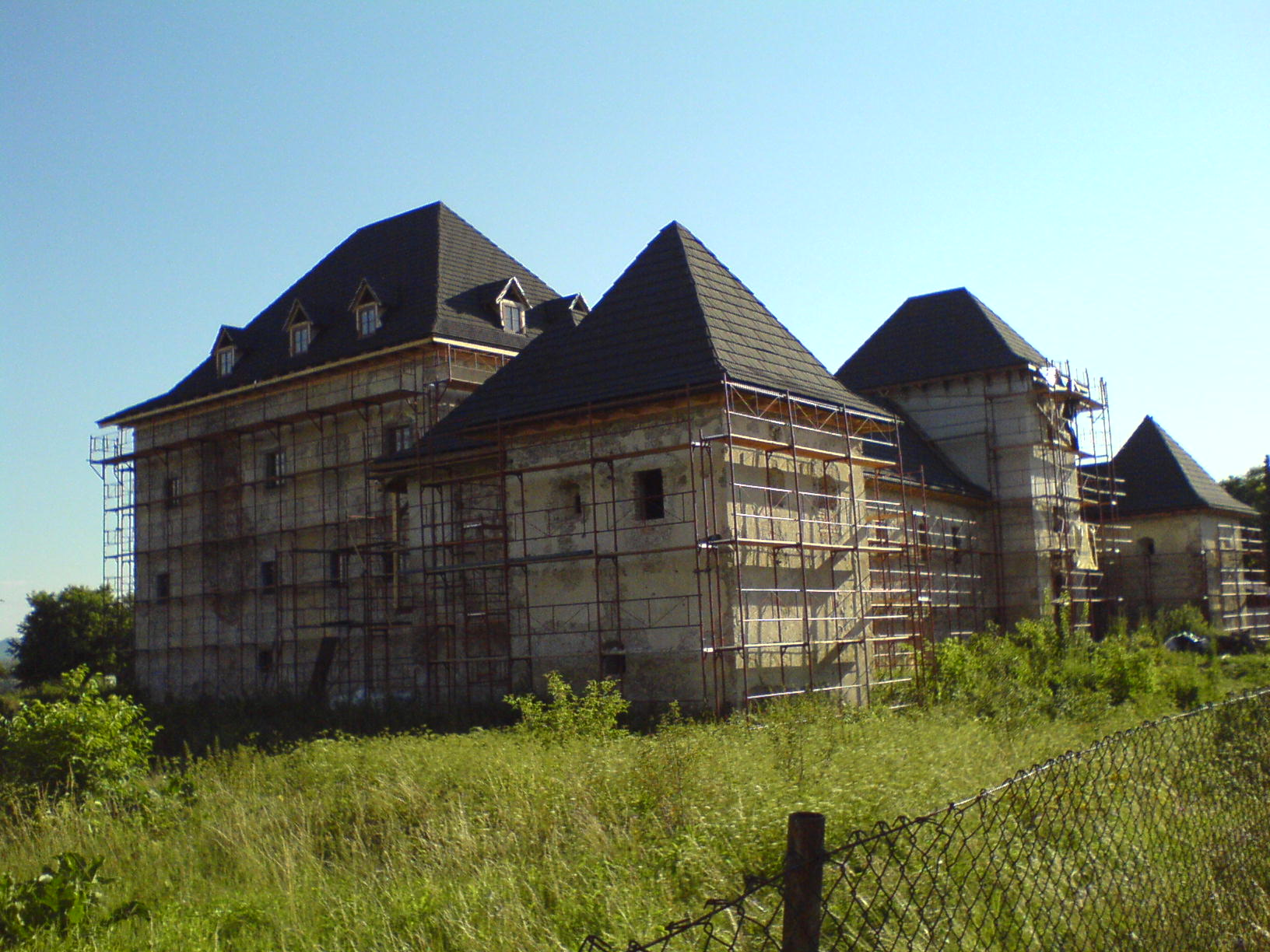 Géczyovský kaštieľ (Vodný hrad) v Hronseku